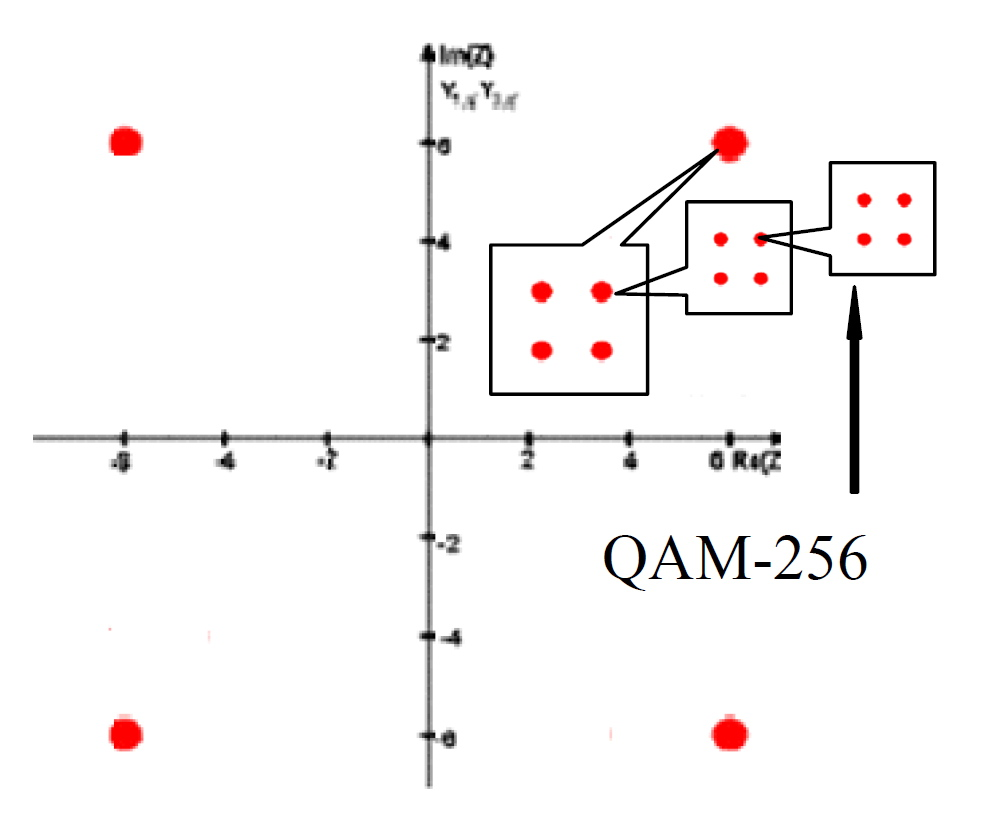 Принцип NOMA для многоканального доступа